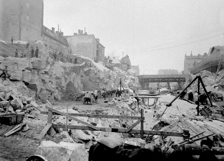 Kungsgatan i Stockholm under byggnad 1909